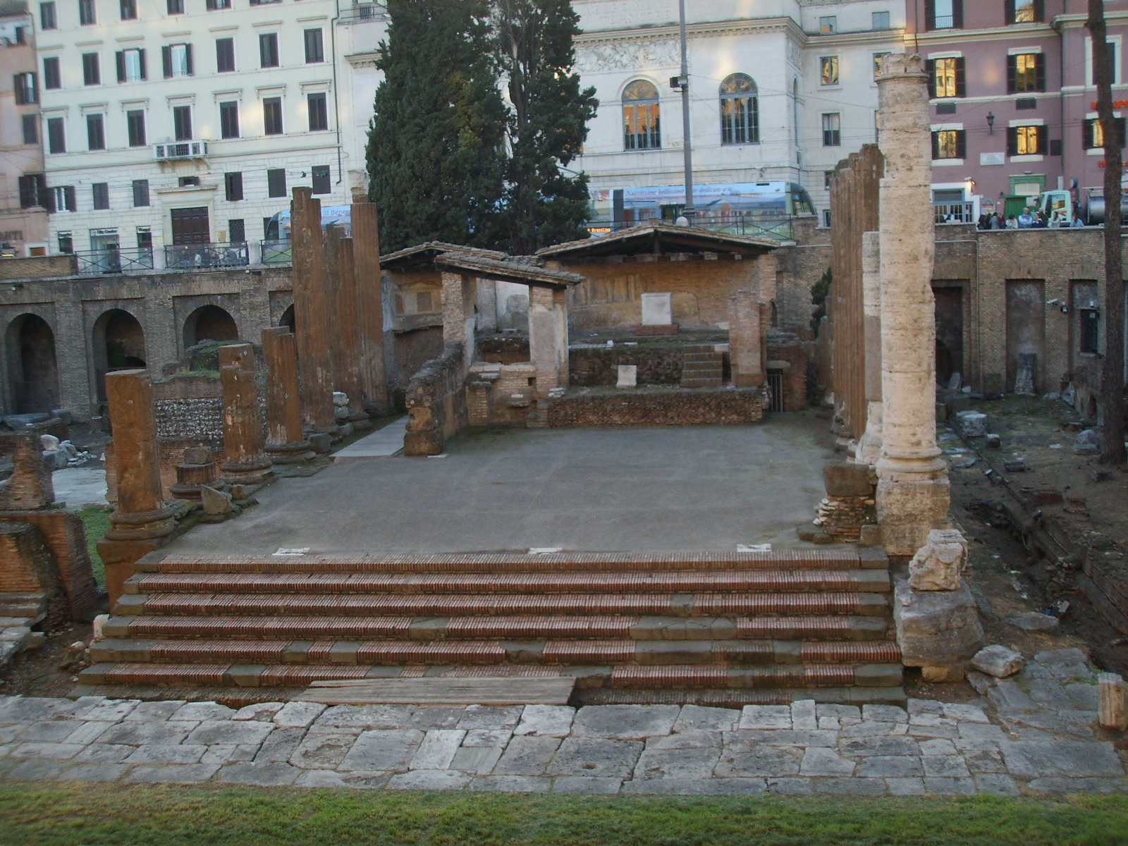 Il "Tempio A" dell'Area Sacra di Largo di Torre Argentina a Roma, risalente al III secolo a.C. Si ipotizza che corrisponda al tempio di Giuturna (ninfa delle fonti) o del tempio di Iunonis Curritis. Il primo fu fatto costruire da Quinto Lutazio Catulo dopo la vittoria dei romani contro Falerii nel 241 a.C.; il secondo da Quinto Lutazio Cercone a seguito della vittoria sui Falerii del suo parente Quinto Lutazio Cercone, sempre nel 241 a.C. L'identificazione più probabile è la prima. Su questo tempio venne costruita la chiesa di San Nicola dei Cesarini, di cui sono ancora presenti alcuni resti (come le absidi visibili in questa foto, ed un altare).